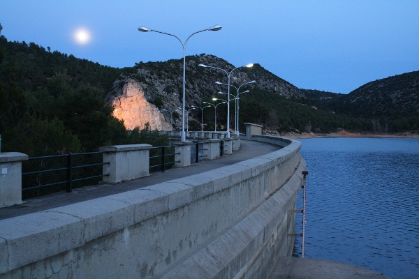 Embalse de Gallipuén, en Berge (Teruel)